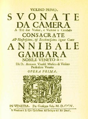 Frontispice de l’Opus I. Frontispice de l’Opus I de Vivaldi imprimé par Giuseppe Sala. Furlan: Copertine de Opus I.